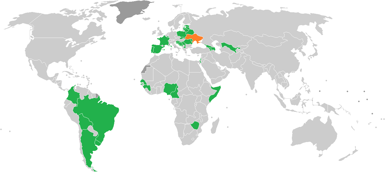 За час виступів «Карпат» в Прем'єр-Лізі честь команди захищали представники 32 країн